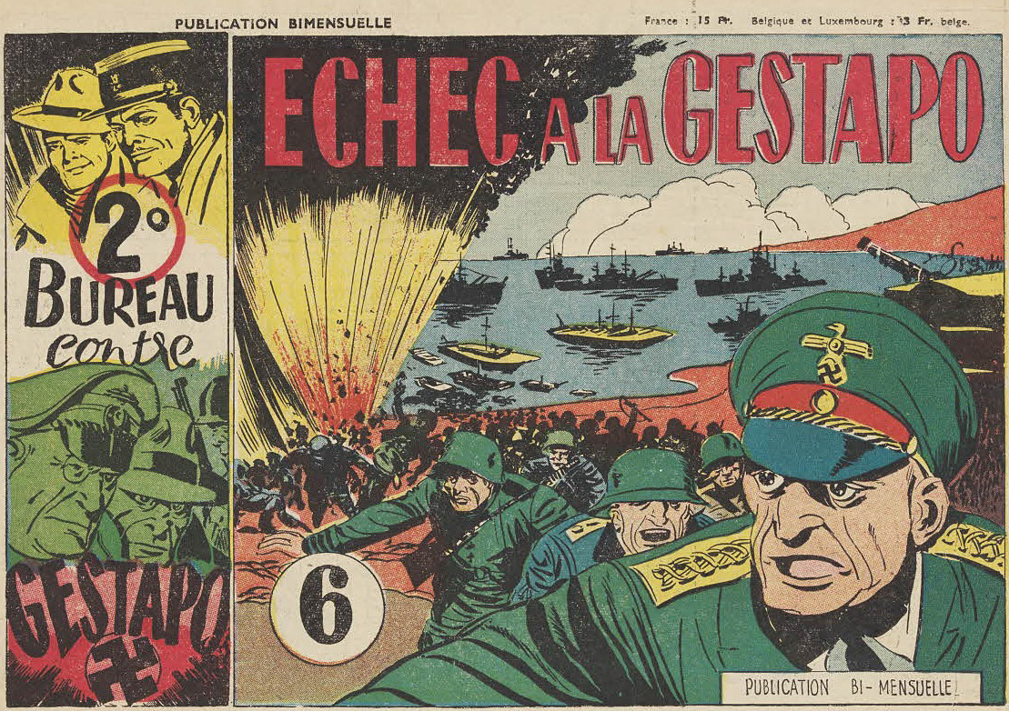 Bande dessinée Échec à la Gestapo. 2e Bureau contre Gestapo, n° 6du 1er octobre 1950. Publication bimensuelle. E.P.M. Edit., 5, rue du Faubourg-Poissonnière, Paris (9e) - Comité de direction : A. Weinstock, Castella, Matheron. - Imprimé en France - Imp. Crété, Corbeil. - Dépôt légal : 4e trim, 1950